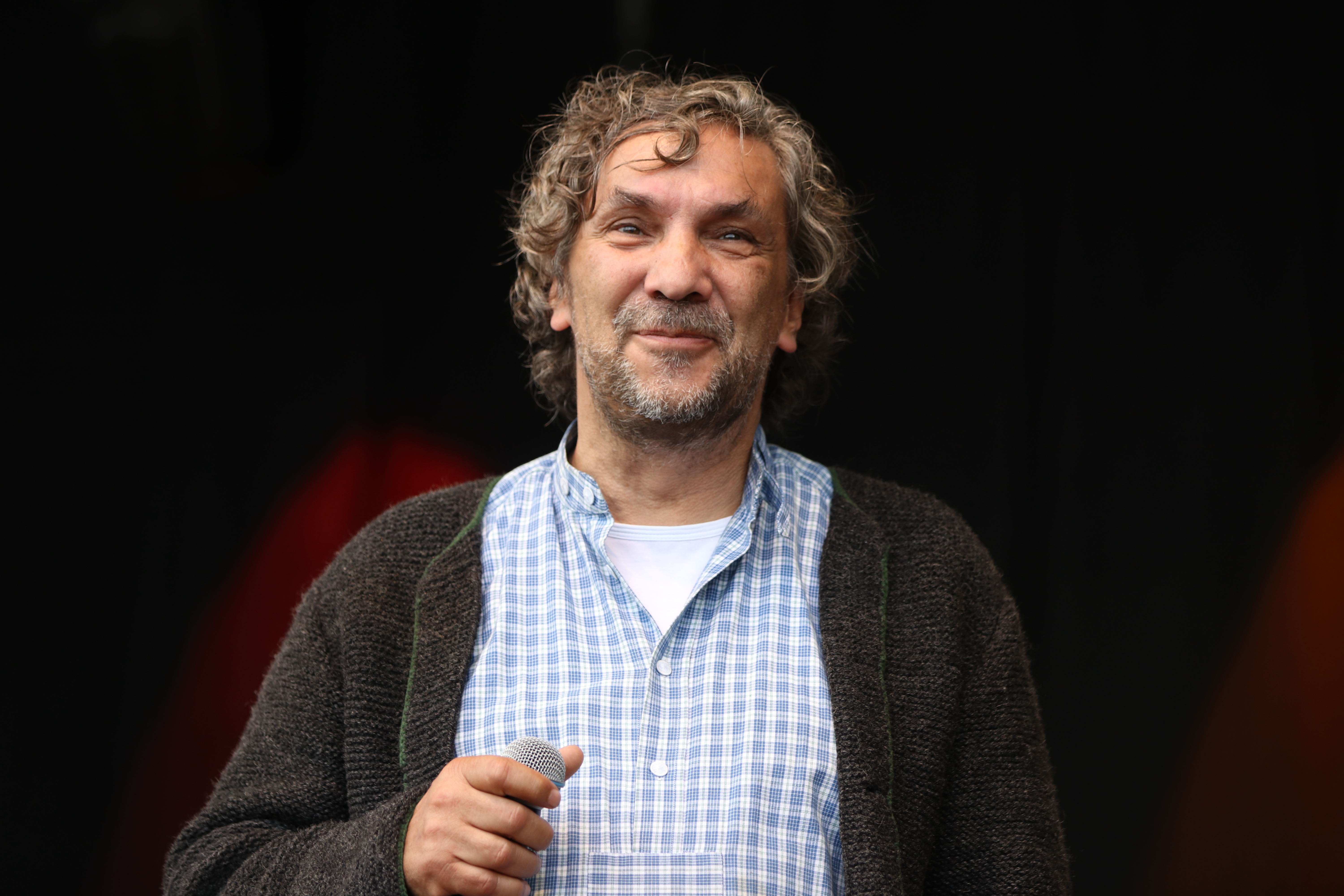 Ausgehetzt, Demonstration in München am 22. Juli 2018 gegen den Rechtsruck in der bayerischen Politik